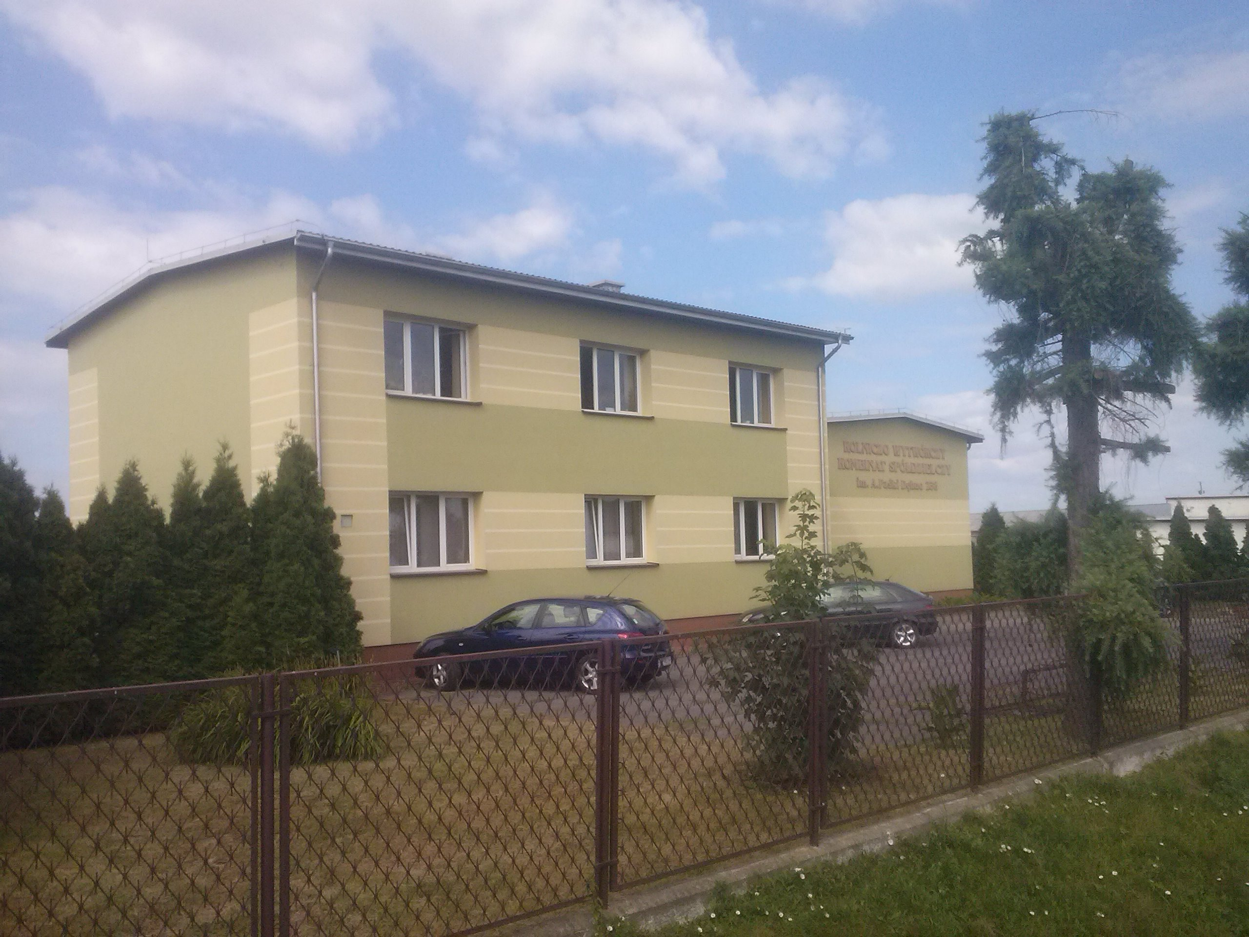 Biurowiec Rolniczo-Wytwórczego Kombinatu